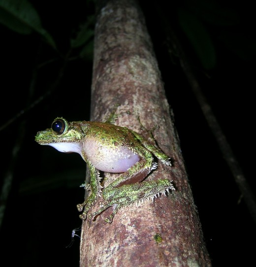 Spinomantis aglavei